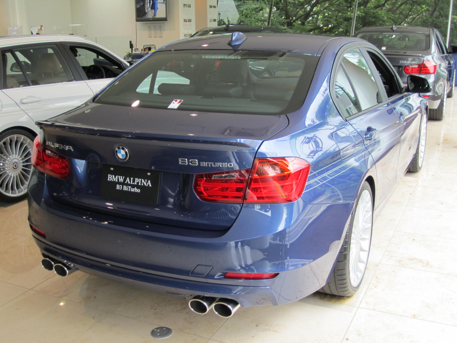 B3リムジンリア